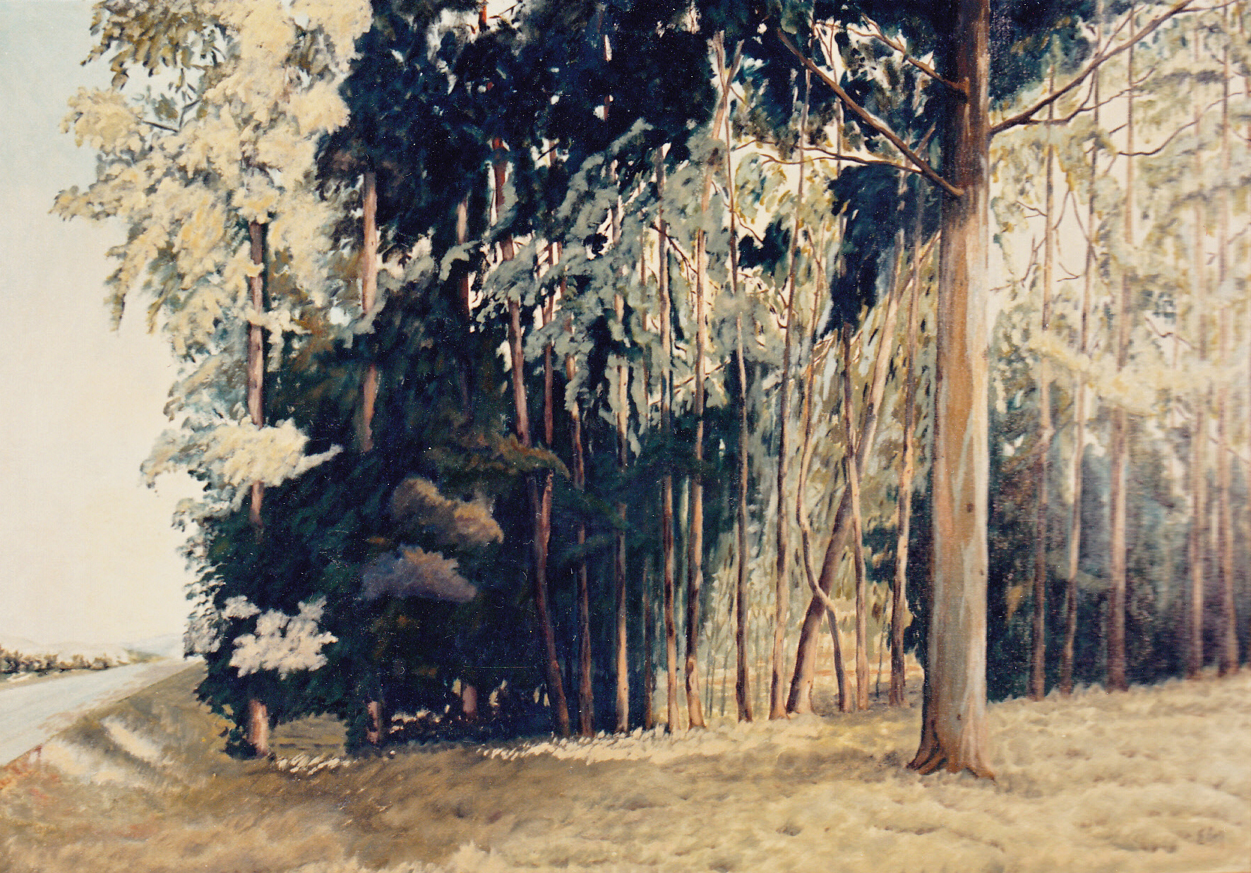 Pintura de Eugenio Cruz Vargas (1923 - 2014). Técnica: óleo sobre tela. Tema: árboles eucaliptus, al atardecer en el Parque Peñuelas, embalse construido entre fines del siglo XIX y comienzos del XX en la Región de Valparaíso, Chile. Autora de la fotografía: Liliana Fuentes quien, por el consentimiento acreditado del propietario titular de los derechos de autor de la obra, publica esta fotografía en internet bajo la Licencia de CC BY-SA 3.0.